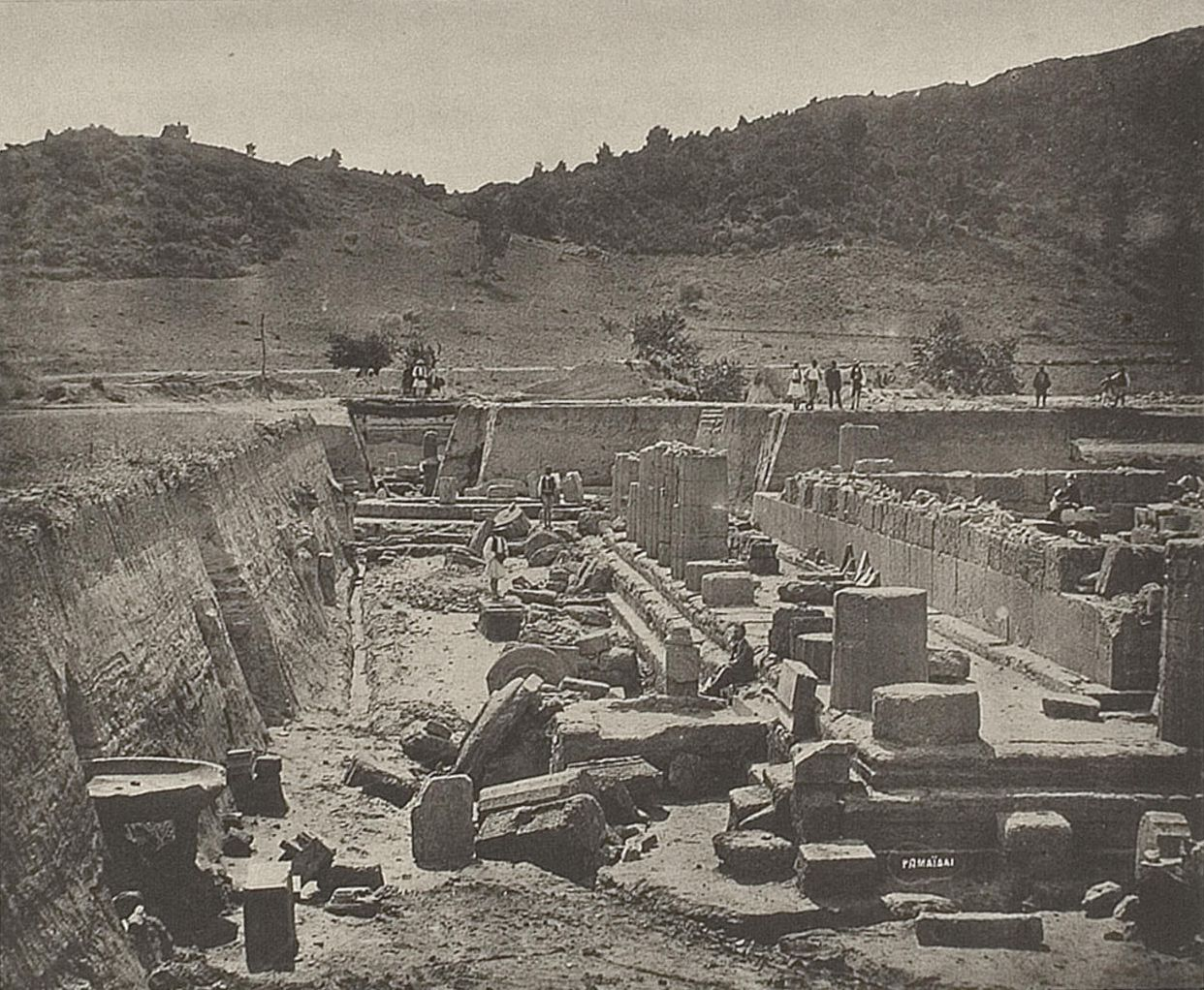 Das Heraion von Südosten gesehen. Innerhalb desselben sind das grosse Bathron im Hintergrunde der Cella, die Reste der Basis, auf welcher einst der Hermes des Praxiteles stand, der Südpfeiler der Eingangsthür und eine der späten Inschriftbasen des Pronaos durch Menschen markirt. Im Vordergrunde stehen längs der Tempelfront mehre Marmorbasen aus römischer Zeit, wie Höhenlage und Profil zu verrathen scheinen. Links sieht man auf der südlichen Cellawand noch die Reste antiker wolgefügter Quadern. In den Säulen der Südreihe Einschnitte zur Einfügung von Inschrifttafeln. Davor, durch Menschen markirt, der Südostecke zunächst, an der sich der Eingang zum Tempel befand, ein quadratisch aus Ziegeln aufgemauertes und mit Marmorplatten ausgelegtes Bassin, in dem einst das Marmorbecken eines Springbrunnens gestanden zu haben scheint, welches auf unserer Photographie links, ganz im Vordergrund am Erdabstiche sichtbar wird. Weiterhin ein Bathron oder der Unterbau des Altars; im Hintergrunde das ringförmige Fundament des Philippeions. Rechts im N. des Heraions die zum Kronoshügel hinaufführende Stufenterrasse. Ganz oben auf dem doppelten Gipfel des Hügels, welcher die ganz Mitte des Hintergrundes einnimmt, rechts das „deutsche Haus“ für die Expeditionsmitglieder, links die Kirche Hagios Georgios, dazwischen einige Häuser des Dorfes Druwa.